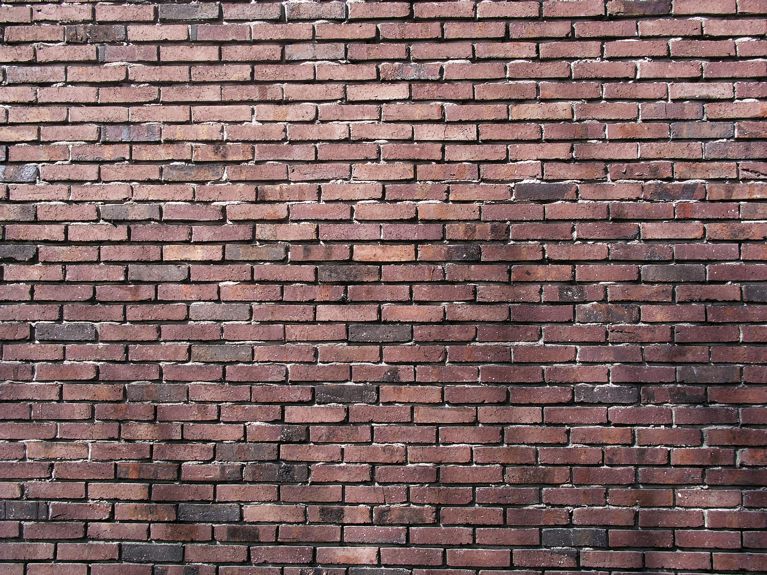 Söderledskyrkan, Farsta församling, Stockholm, Sweden. The picture was taken by Håkan Svensson (Xauxa) the 23rd of April in 2005.